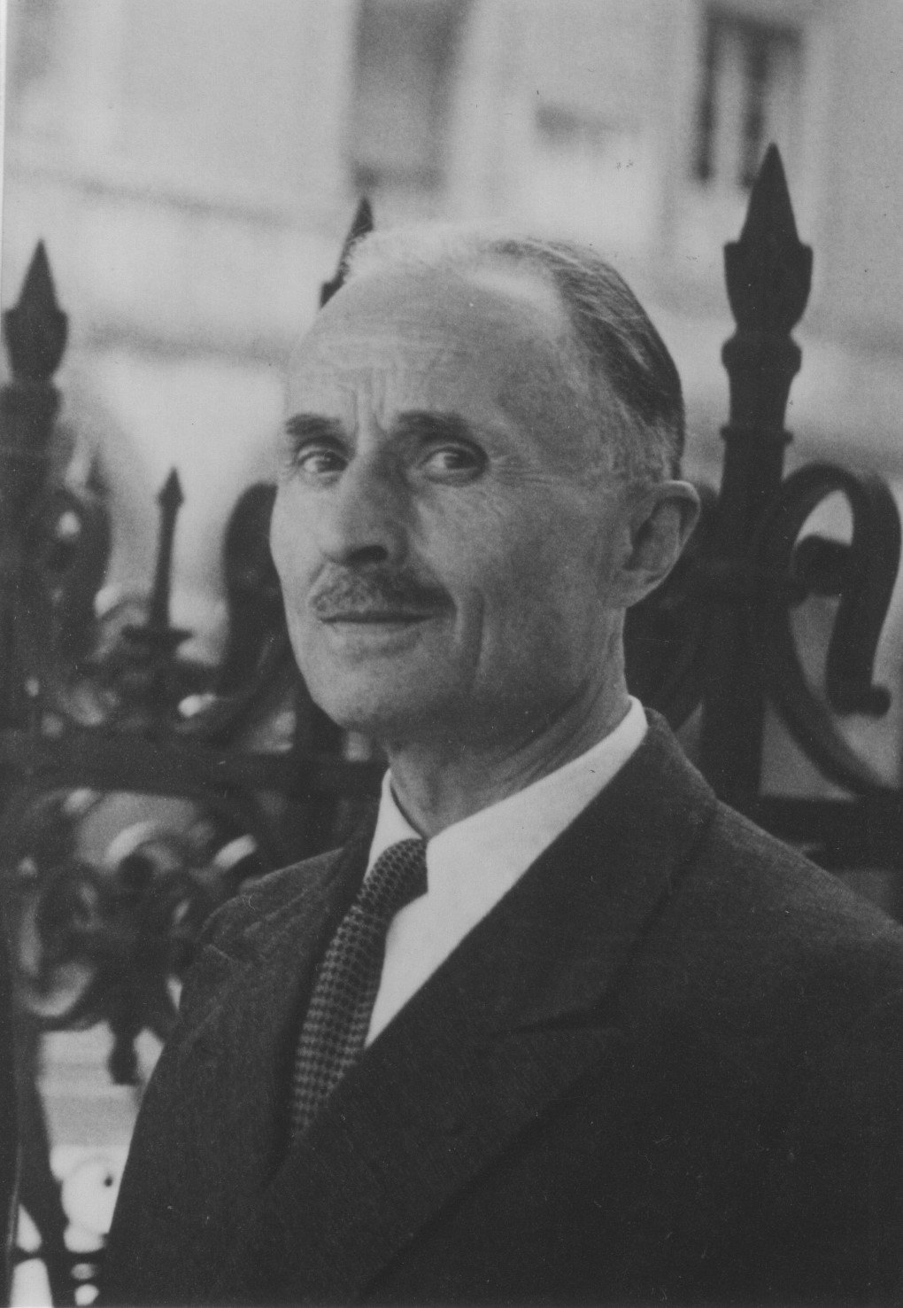 Marcel Petit, résistant dans le réseau SOE Prunus, déporté à Dora, Inspecteur général des Écoles nationales vétérinaires. Proto prise à Lyon en 1956